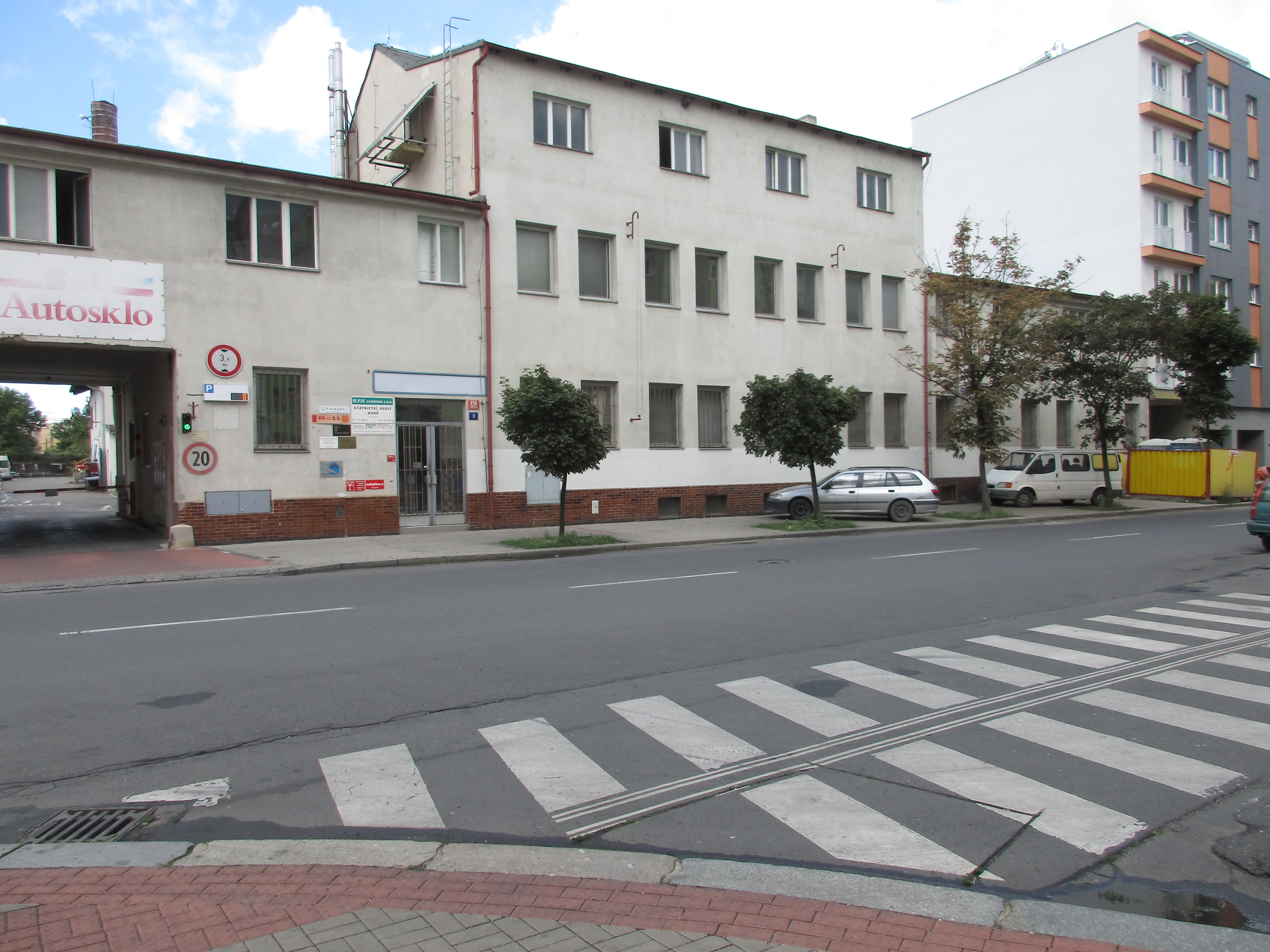 Cukrovar Vršovice, Petrohradská 216/3.